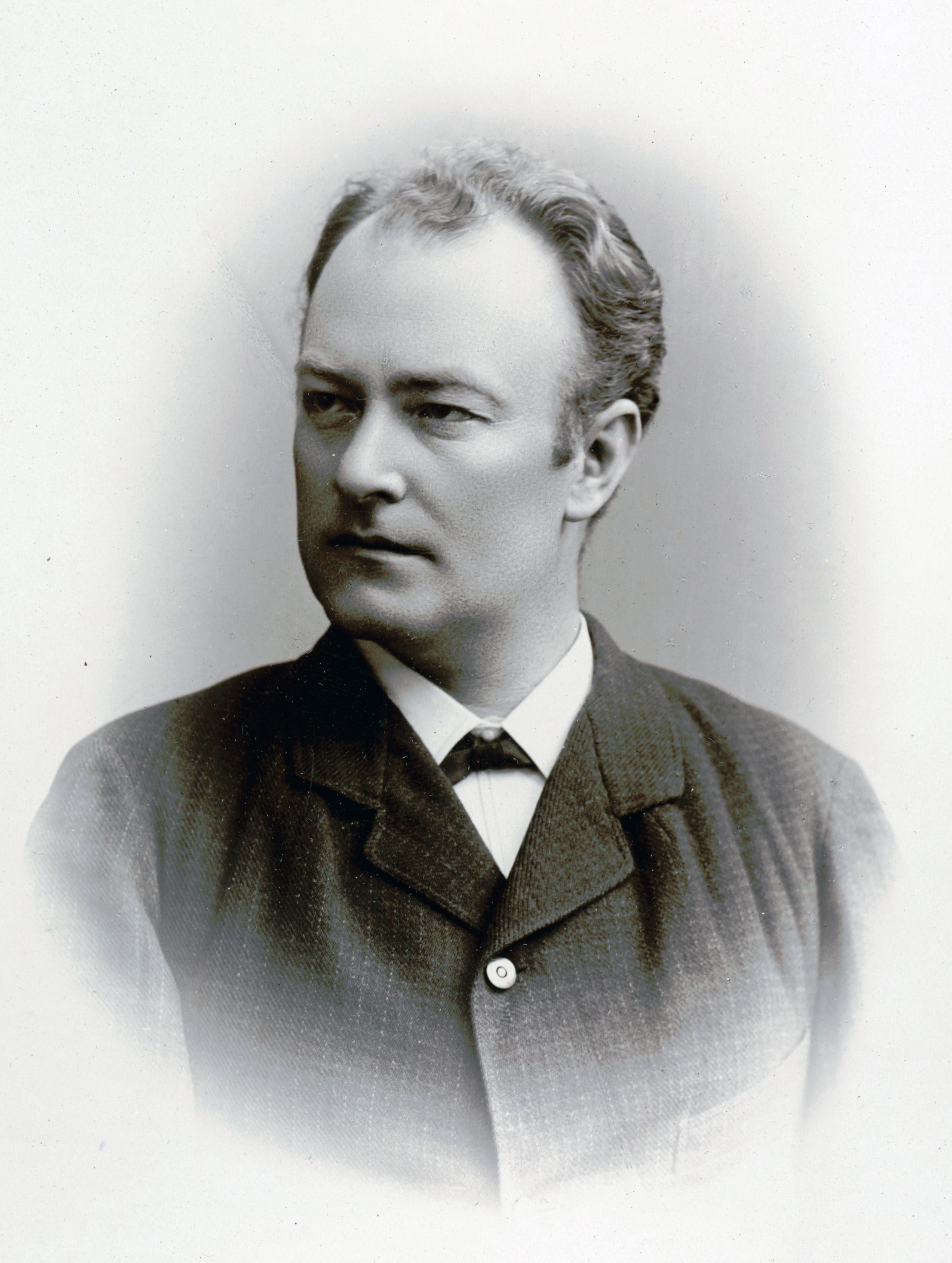 Konstantin Axelsson, skådespelare vid August Lindbergs sällskap 1884